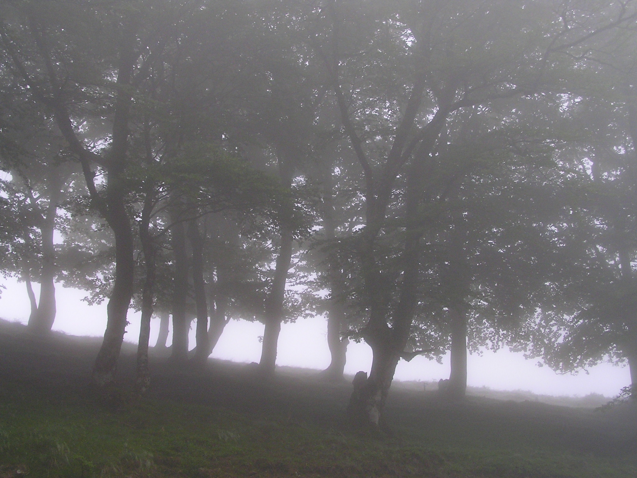 Foret d'Iraty sous la brume. Photo prise en milieu de journée, depuis la route. Auteur : Utilisateur:olav2 Juin 2004 Olav2